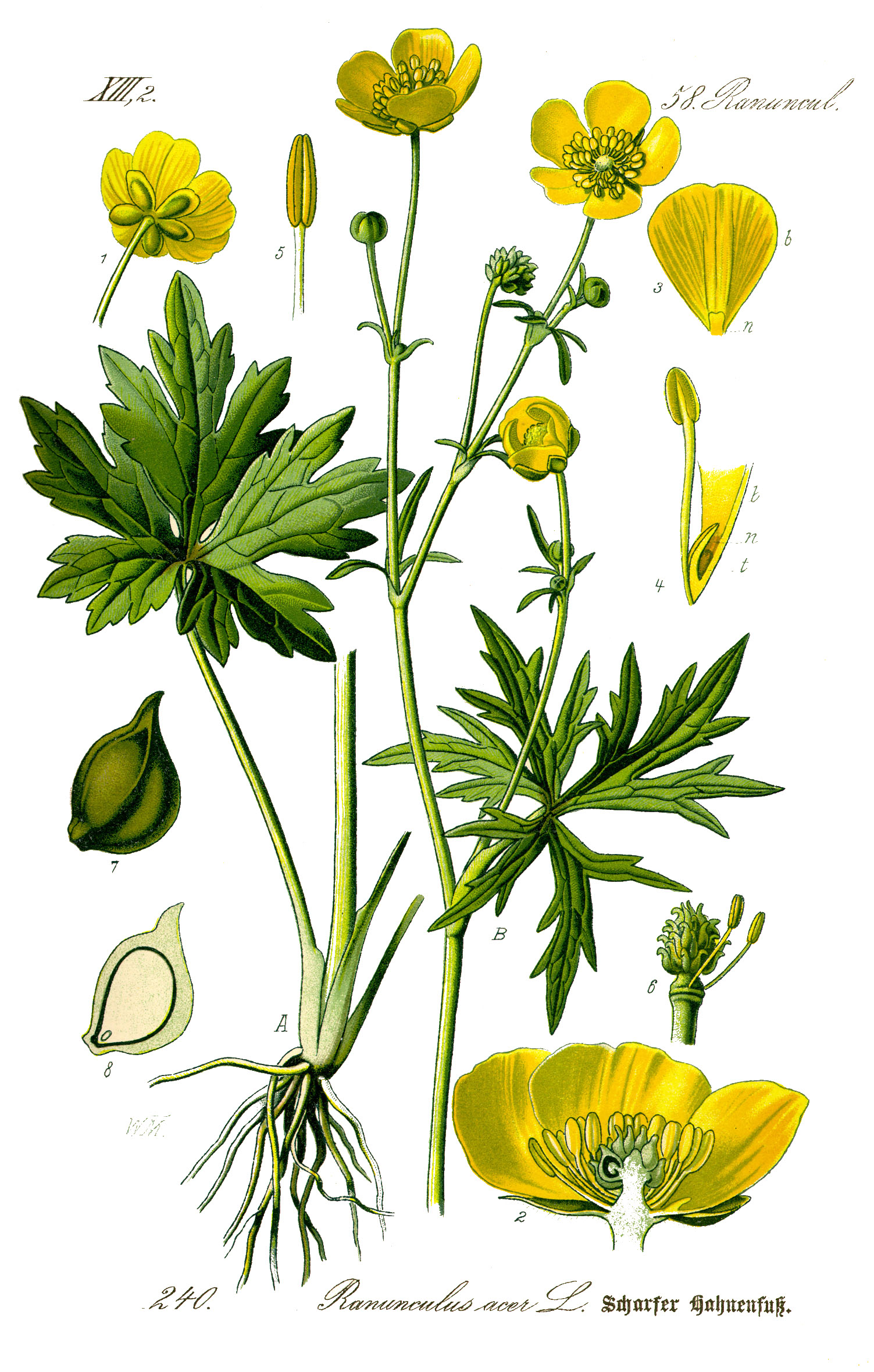 Name Ranunculus acris Family Ranunculaceae